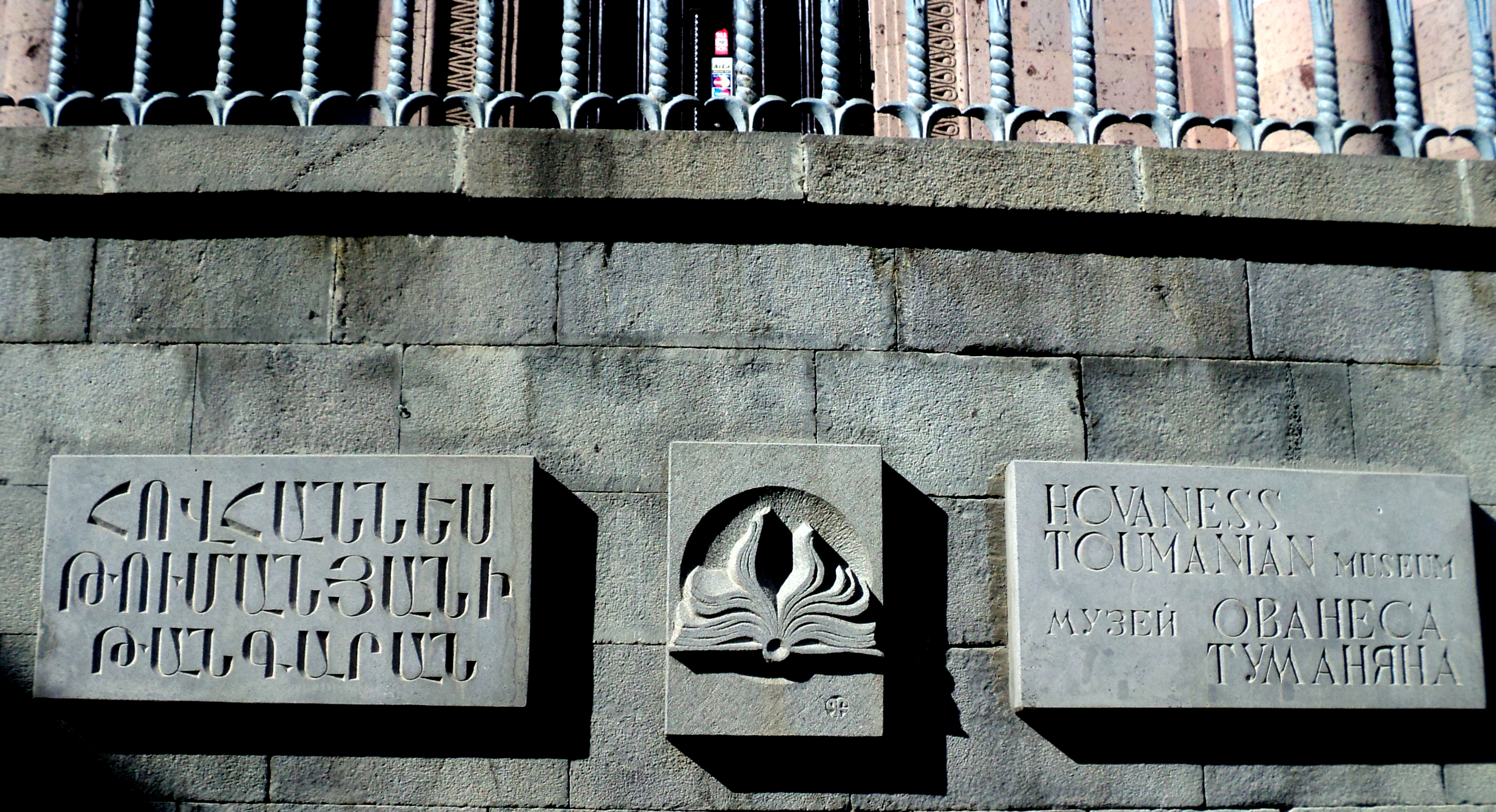 Հովհաննես Թումանյանի թանգարան